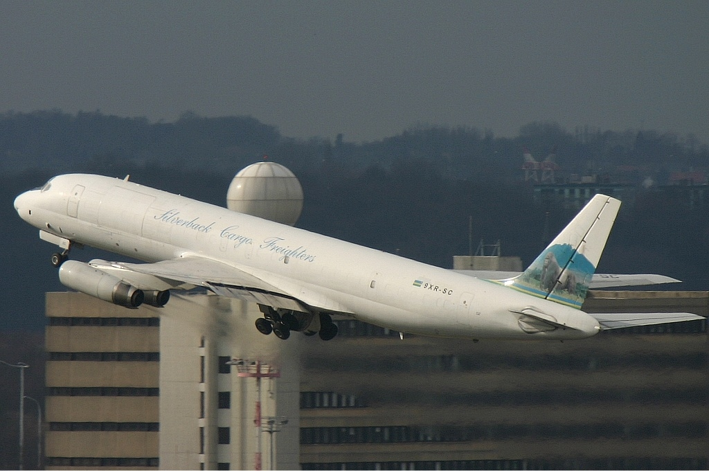 Silverback Cargo Freighters McDonnell Douglas DC-8-62H(F)